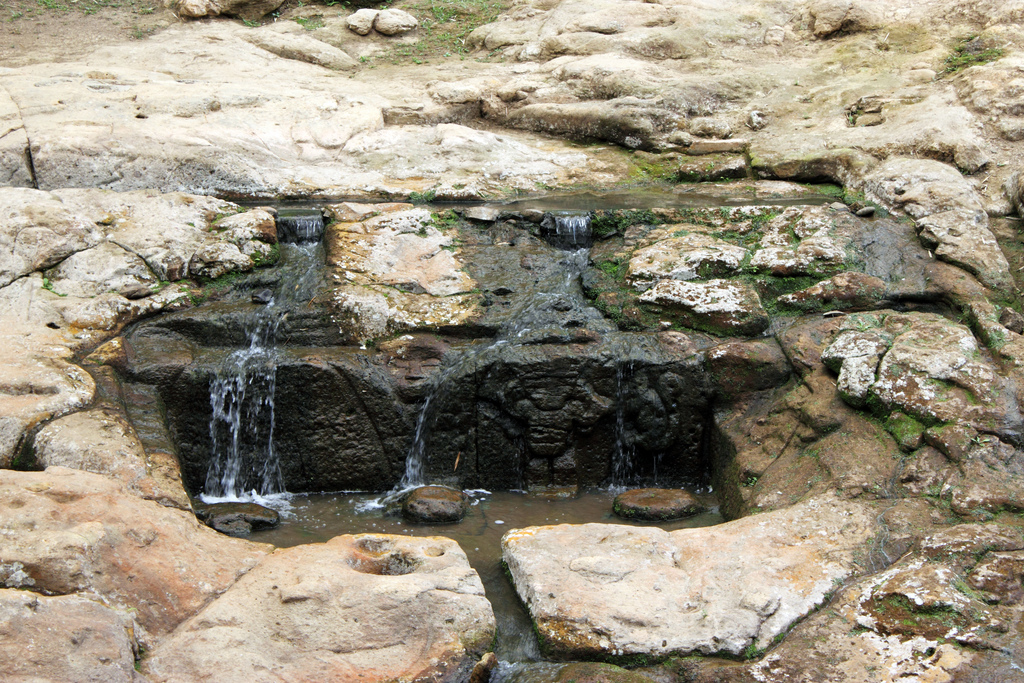 Parque arqueológico de San Agustín